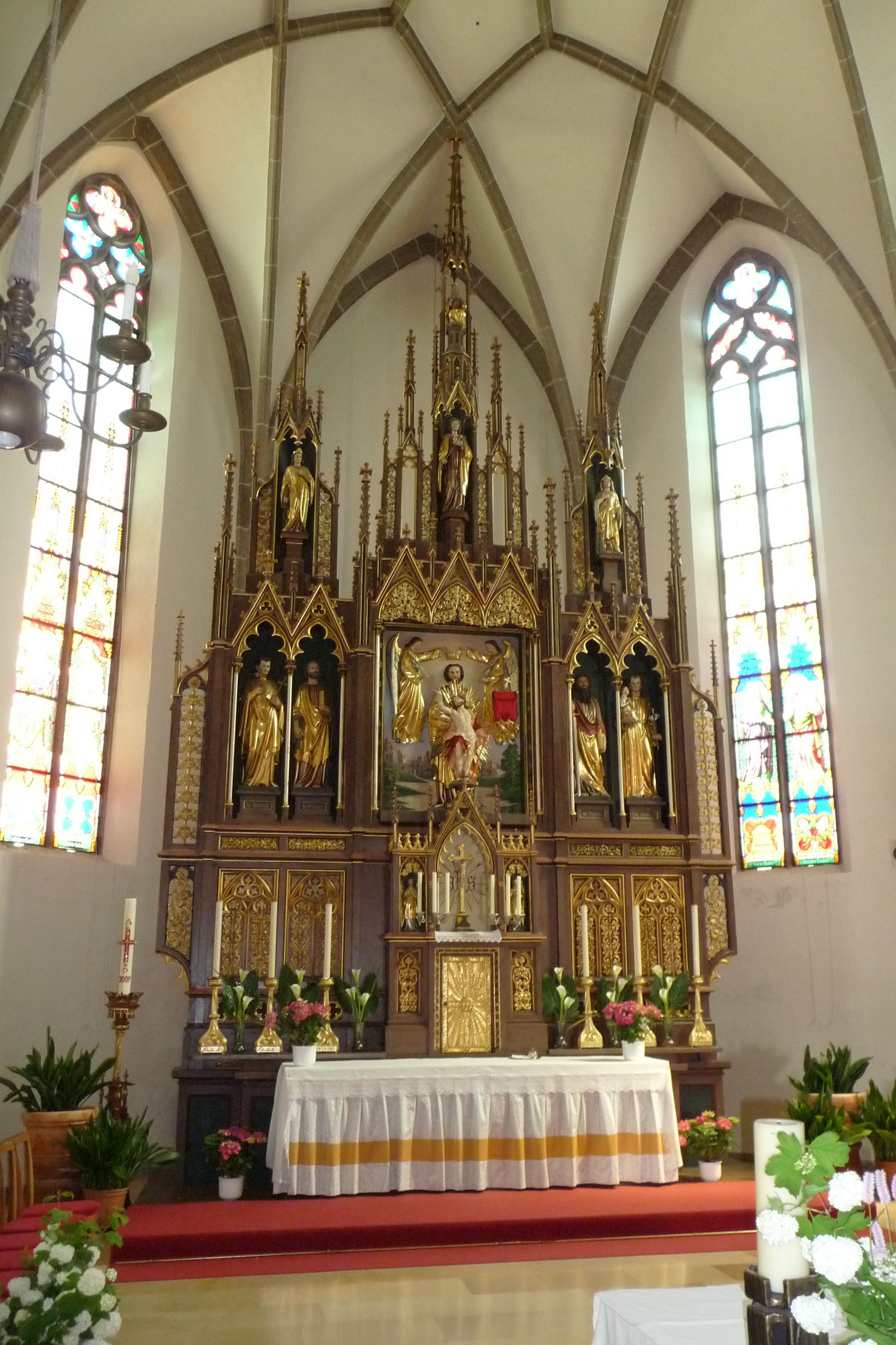 Altar in der Stadtpfarrkirche Bad Leonfelden